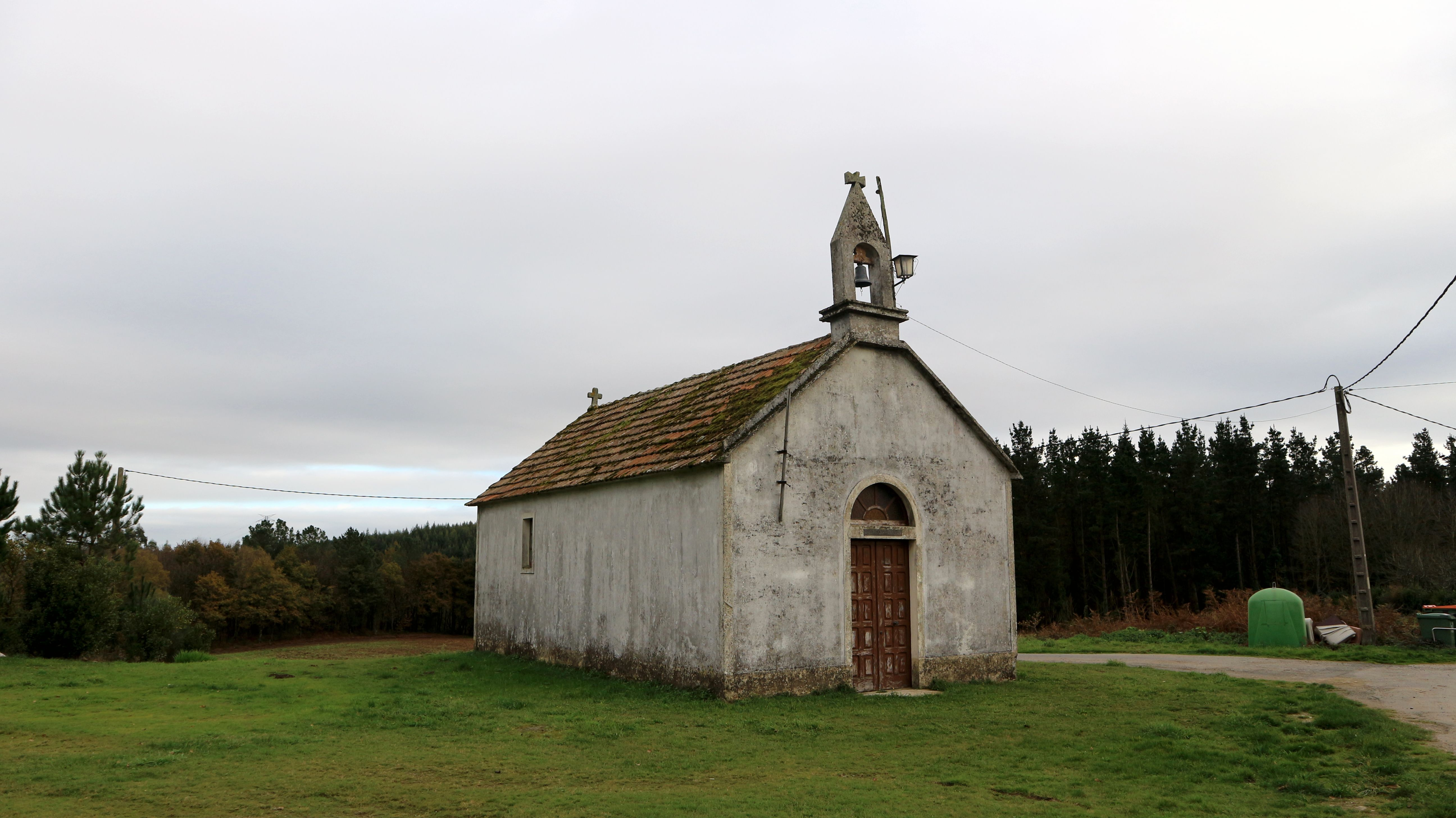 Ermida da Quinta Angustia en Suaermida, preto de Borducedo Pequeno. En Vizoño, Abegondo.